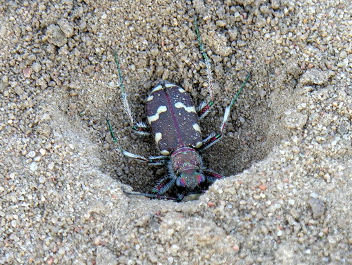 Baltalūpis šoklys (Cicindela hybrida). Šeima. Šokliai (Cicindelidae)